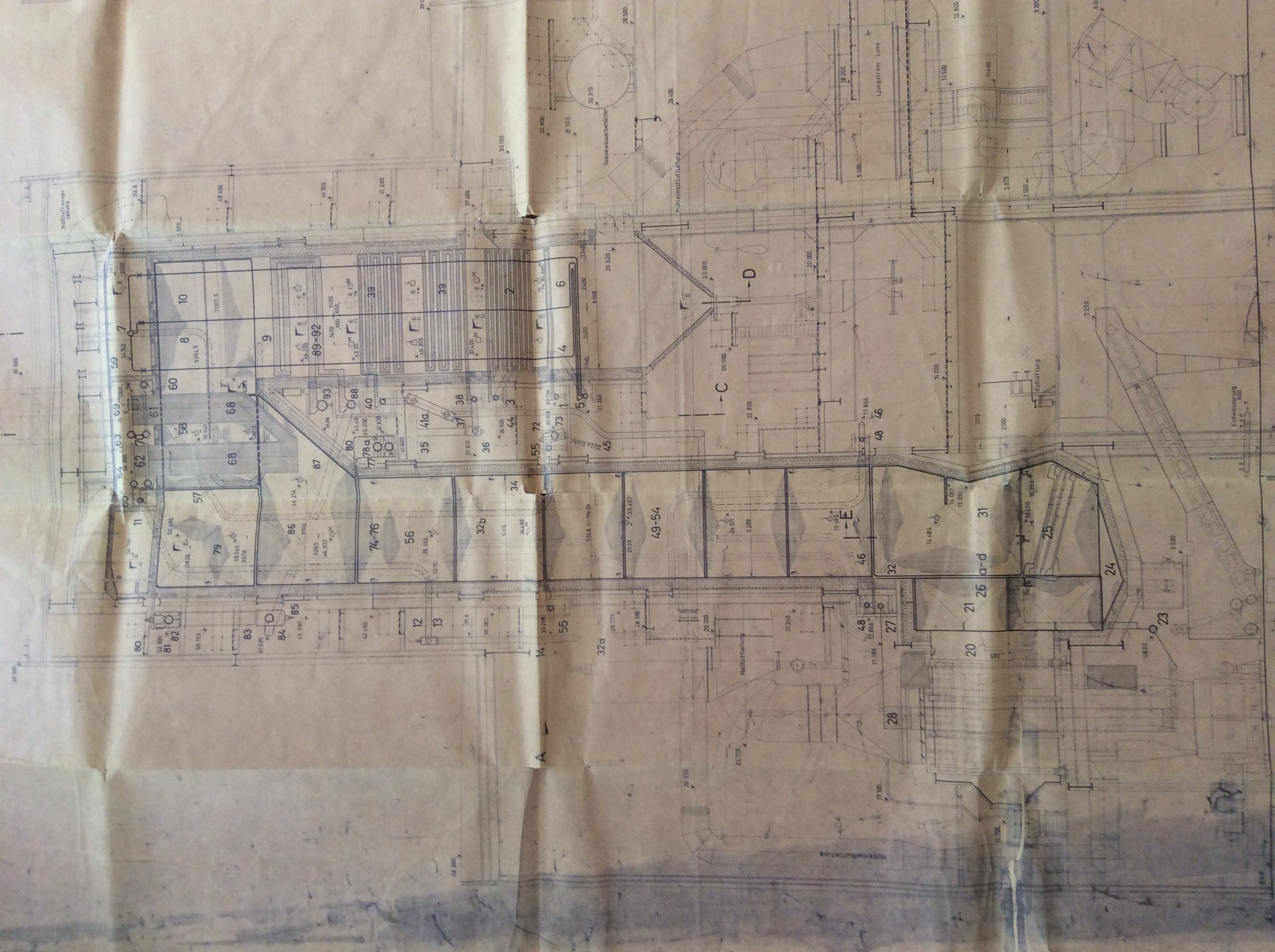 Bauplan BensonKessel mit Zyklonfeuerung Block 2 Kraftwerk Rauxel